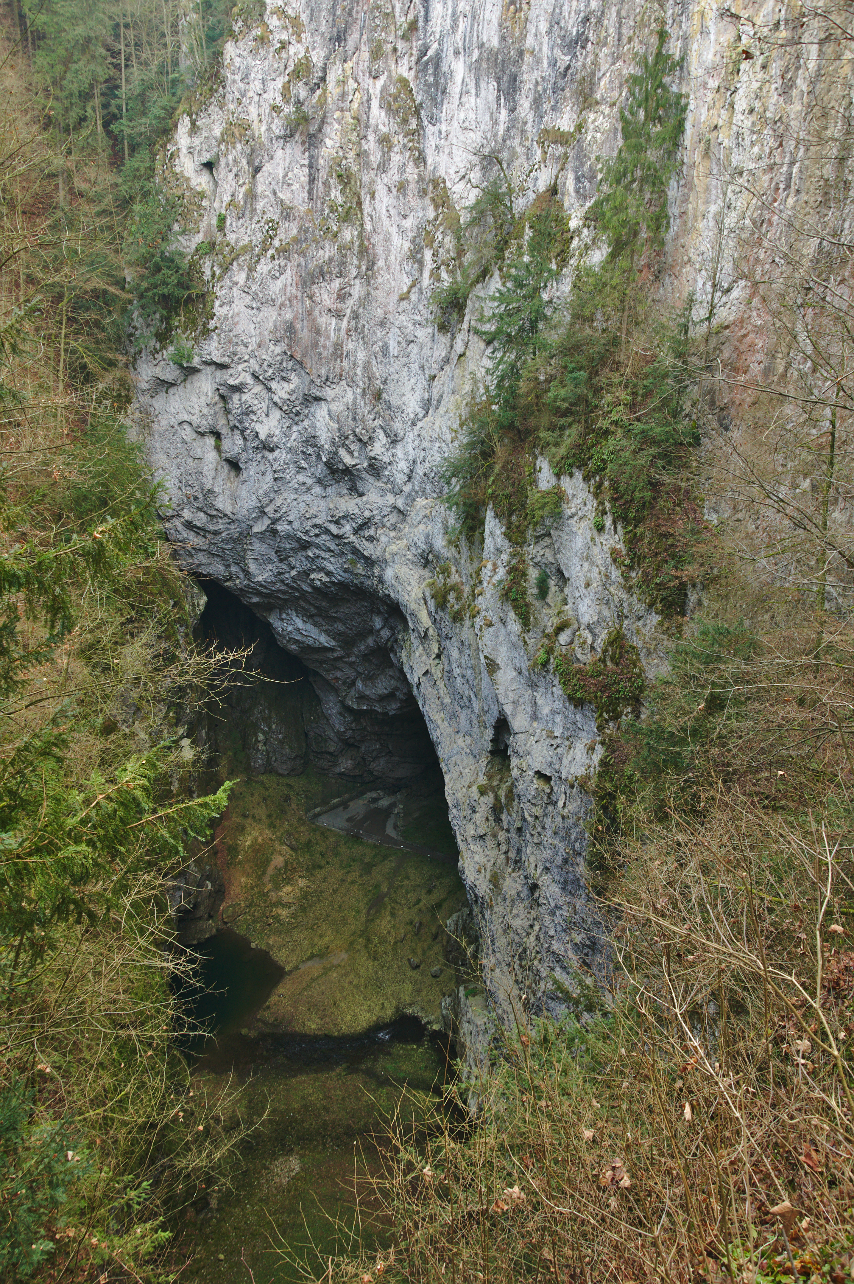 Pohled na dno propasti z Dolního můstku, Macocha, Ostrov u Macochy, okres Blansko